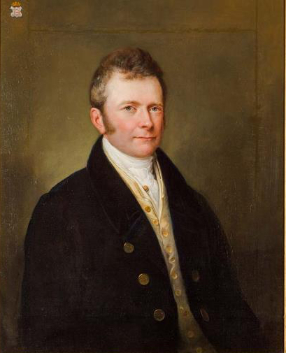 Portrait de Christian van Nagell, homme politique dans le Royaume des Pays-Bas du XIXe siècle